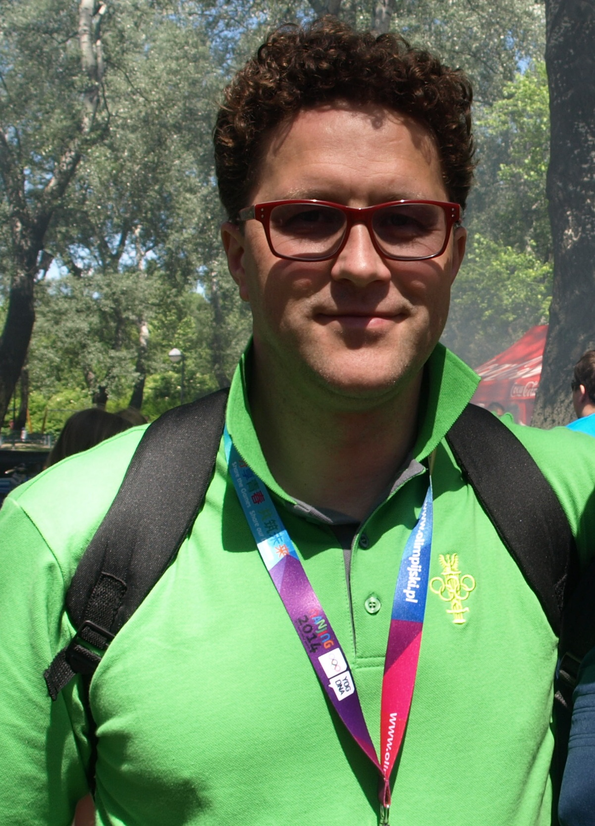 Polski kajakarz Piotr Markiewicz z Augustowa